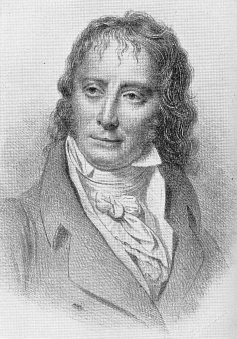 Benjamin Constant de Rebecque (1767-1830}, zeitweise Geliebter der Baronin Madame de Staël (1766-1817) und Vater ihres vierten Kindes Hedwig Gustava Albertine Baronesse de Staël-Holstein (* 08.06.1798 † 28.09.1838 Paris). 1805 trennten sich Constant und Madame de Staël. Die Tochter heiratete als 18-jährige am 20.02.1816 in Pisa den 31-jährigen Achille Charles Leonce Victor Herzog de Broglie (* 01.12.1785 Paris † 25.01.1870 ebenda), später Pair von Frankreich und Minister. Die Tochter Albertine wurde bekannt als religiöse Schriftstellerin ("Les Fragments sur divers sujets de Religion et de Morale")